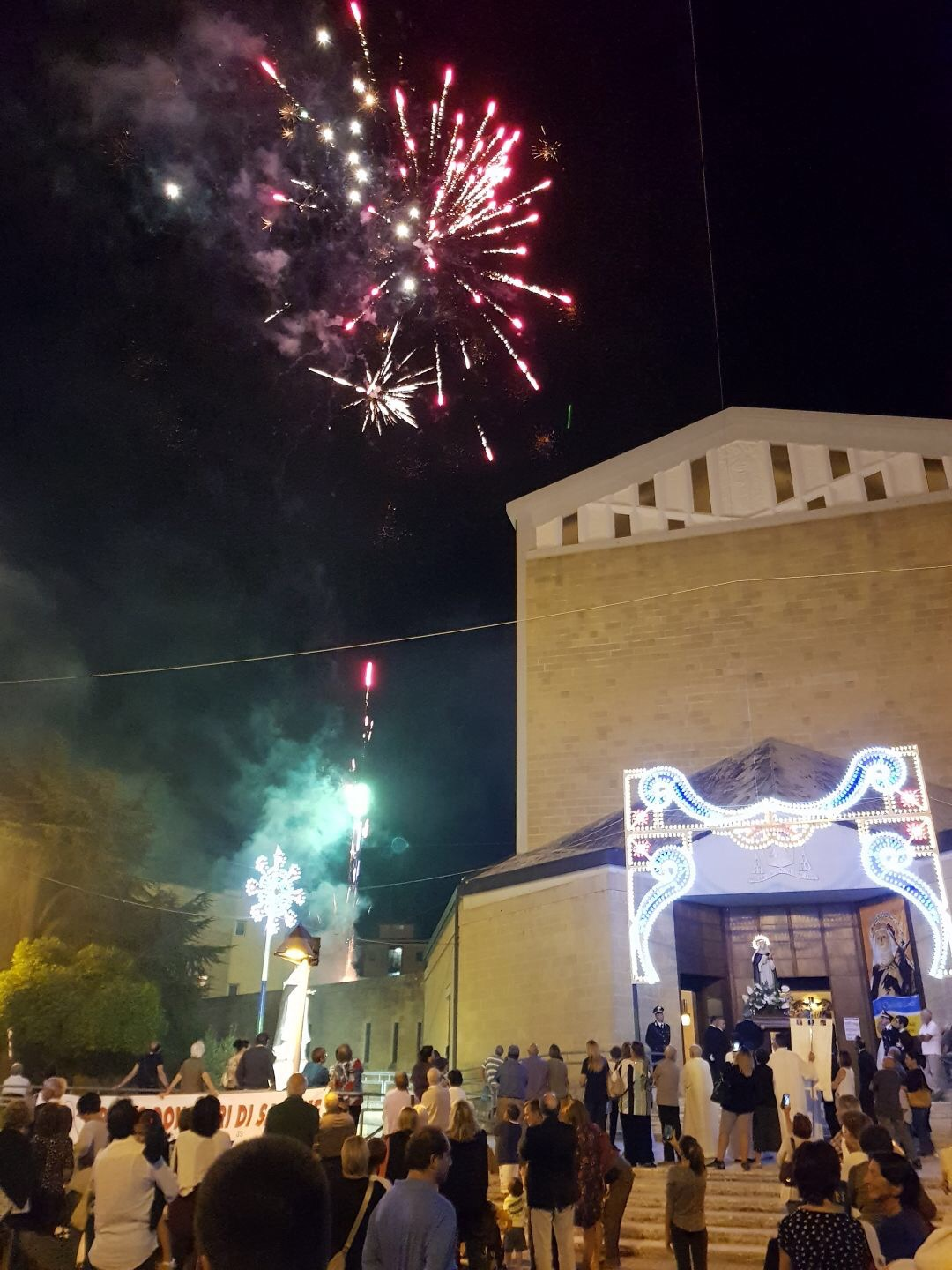 Festività civili per la ricorrenza di Santa Rosa Lima nella parrocchia del quartiere dedicato a lei nella città di Lecce.